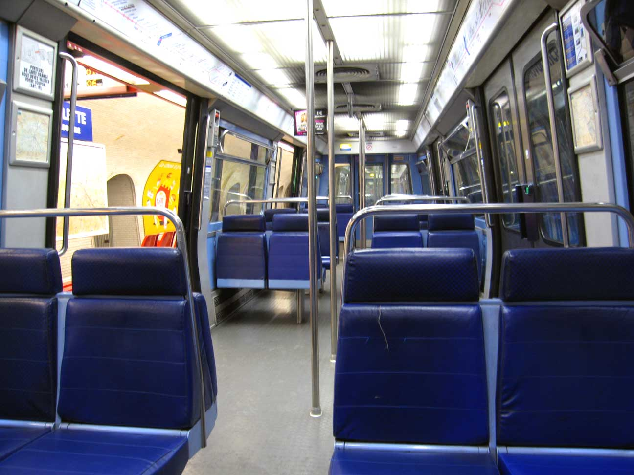 Description : Intérieur Rame MF77 stationnée porte de la Villette sur la ligne 7 Date : juillet 2006 Author : Pline photo personnelle